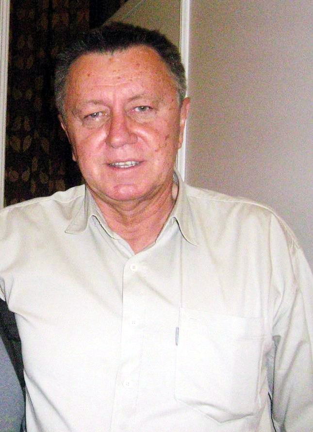 Marek Jóźwik – polski dziennikarz sportowy, były lekkoatleta, olimpijczyk z Monachium 1972